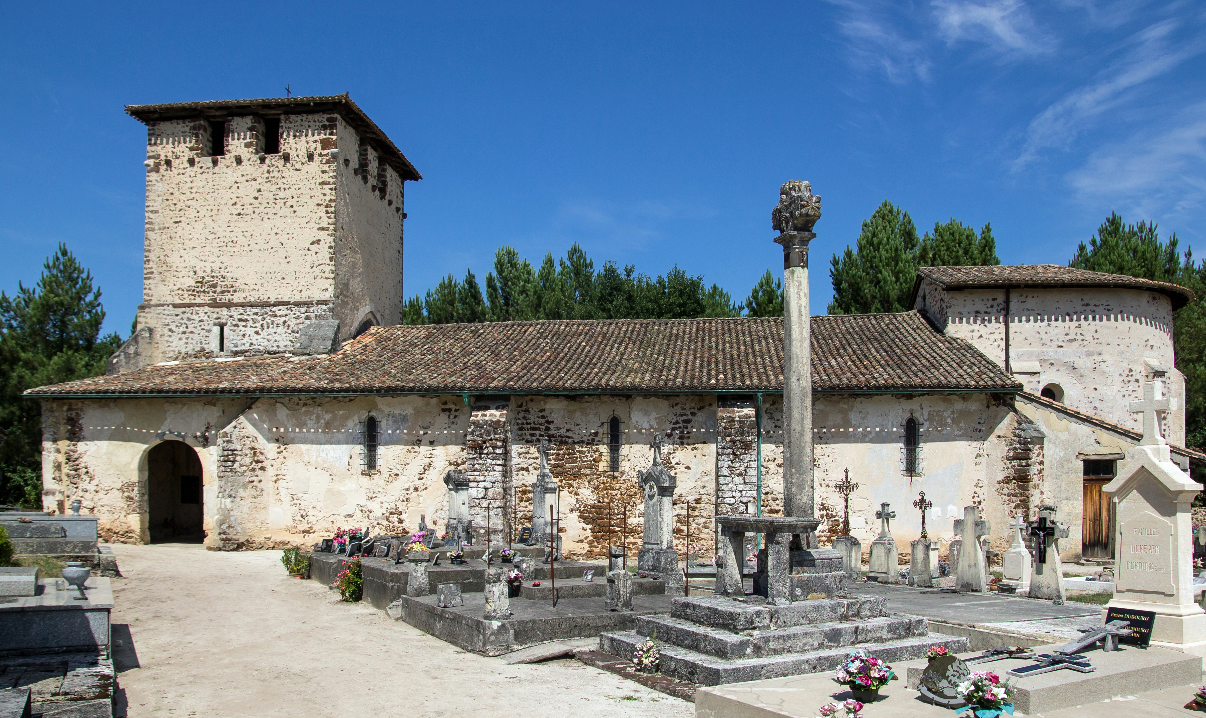 Église Saint-Pierre-de-Mons de Belin-Béliet (Inscrit) .